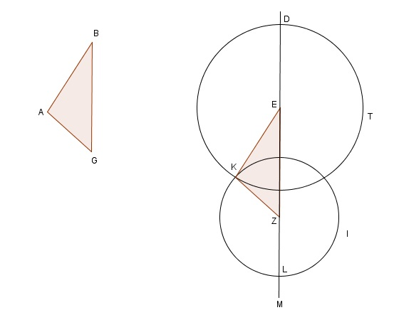 Il·lustració d'una de les proposiciones de les Data d'Euclides